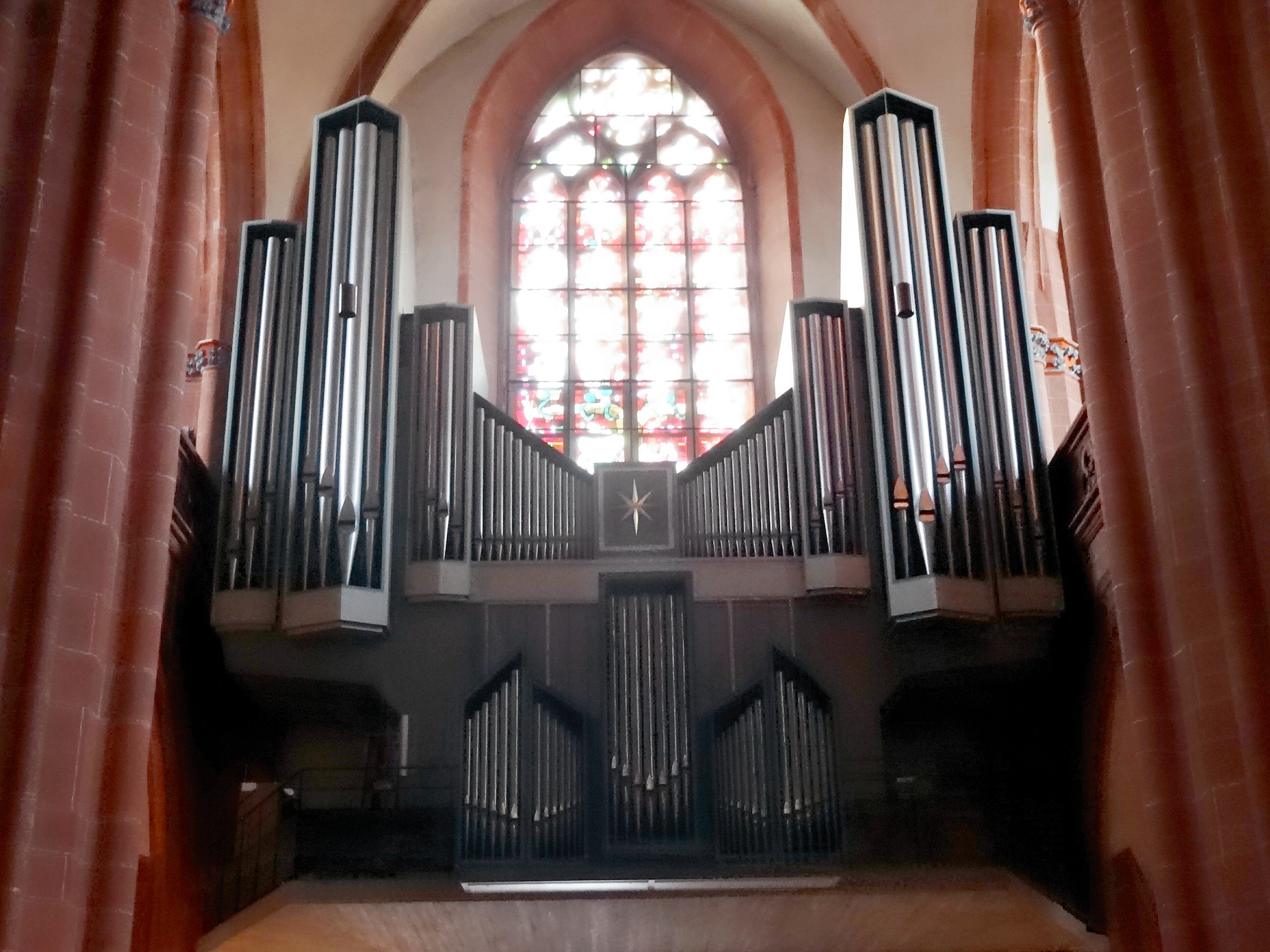 Stadtkirche Friedberg